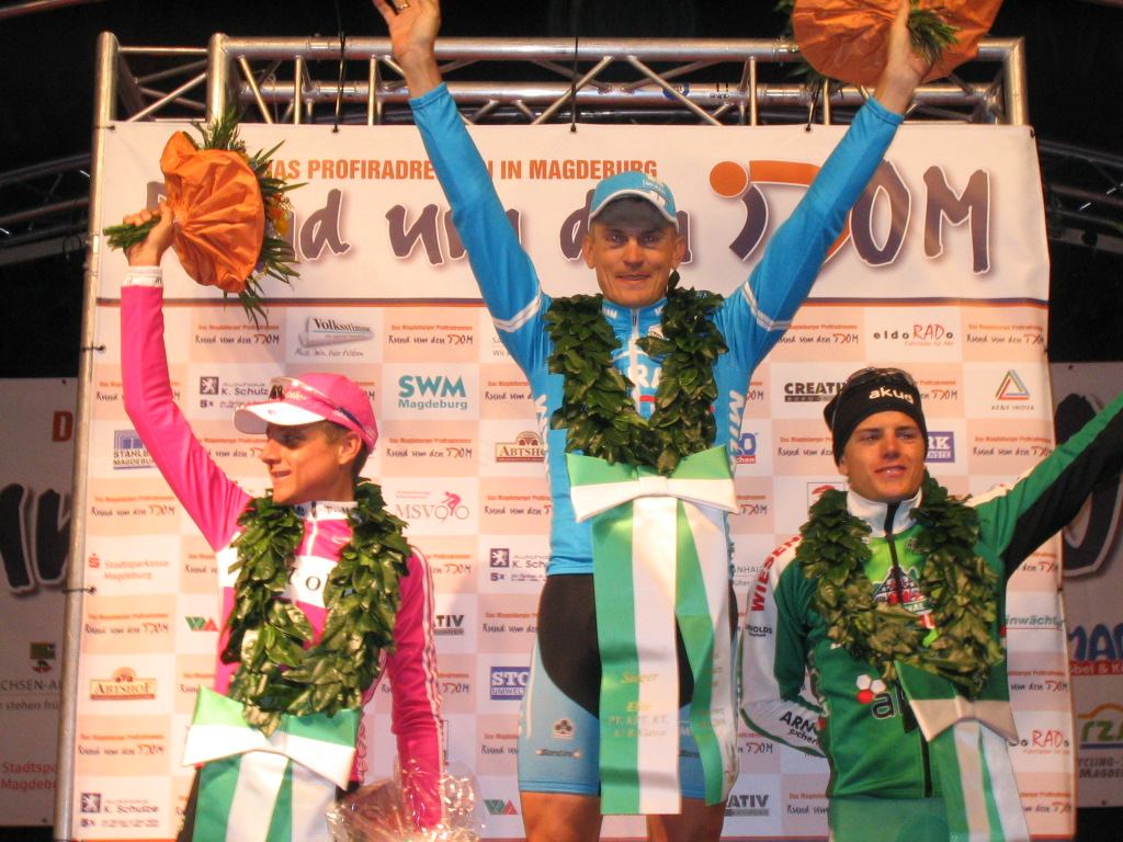 Sieger der Radrennens "Rund um den Magdeburger Dom"